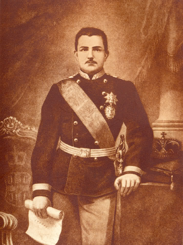 Kralj Milan I Obrenović, prvi kralj Srbije posle kosovskog boja, Naslednik kneza Mihajla Obrenovića i otac kralja Aleksandra Obrenovića